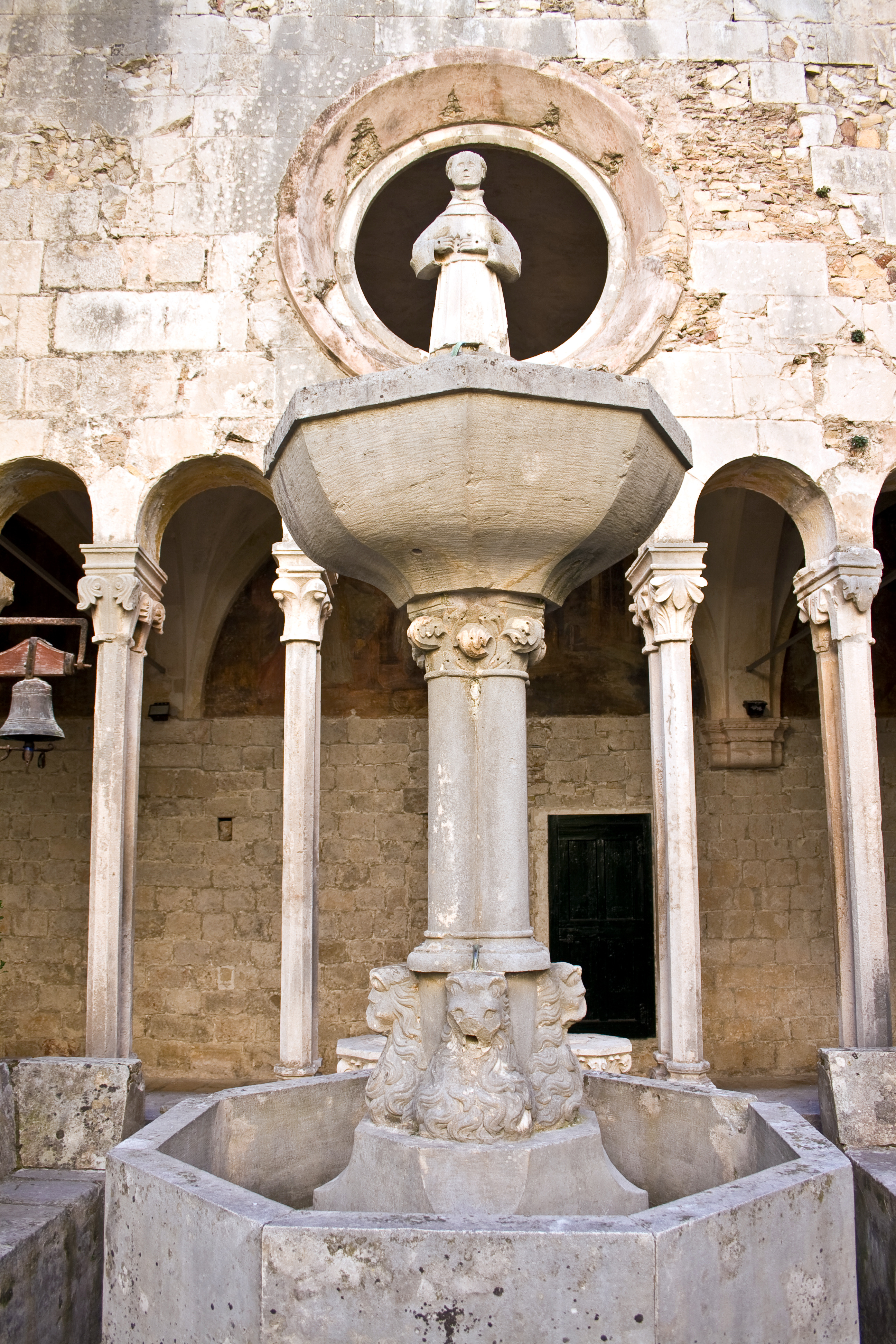 Dubrovnik,_Franziskanerkloster, Detail, Innenhof